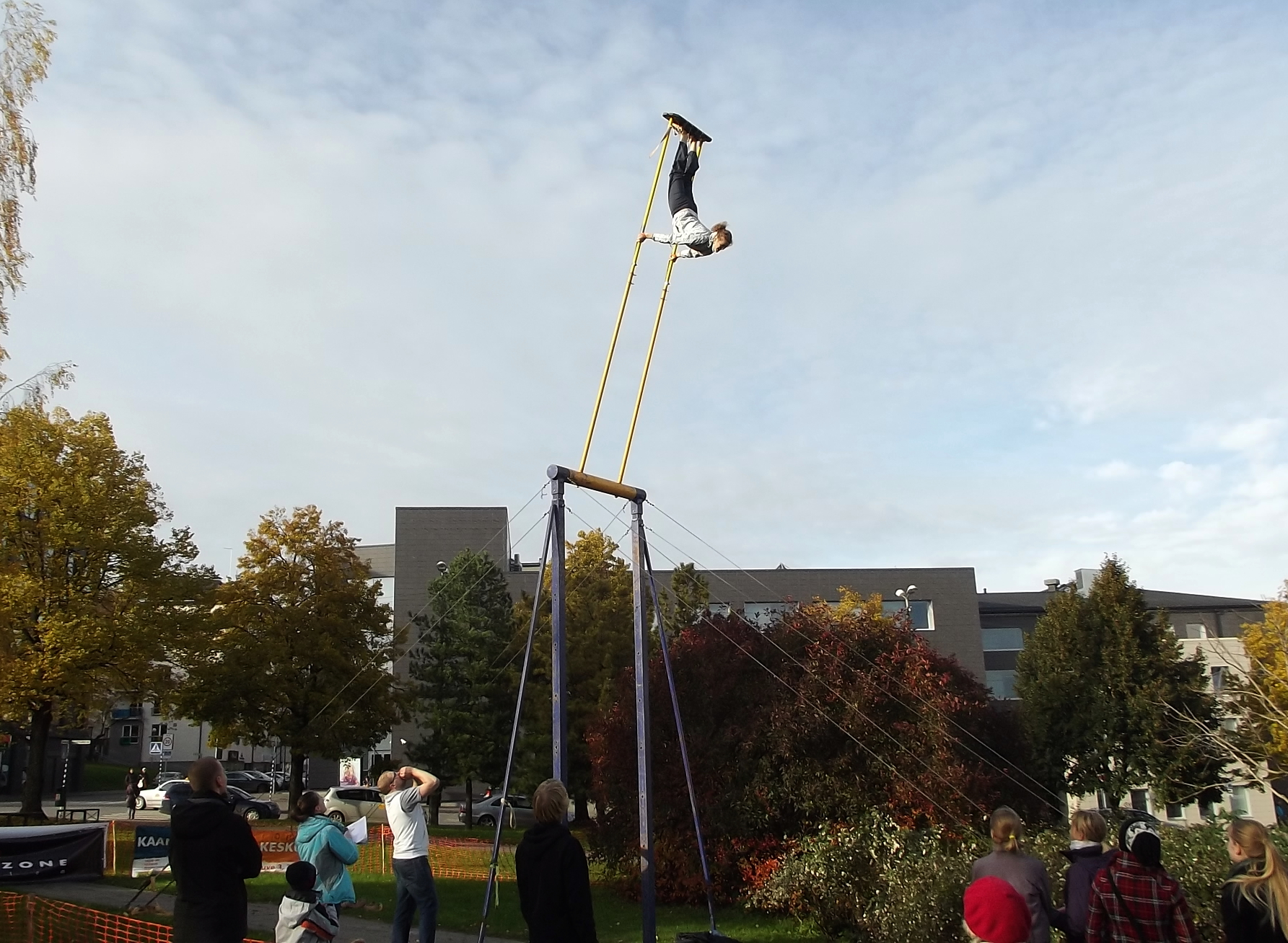 Kiiking Tartus